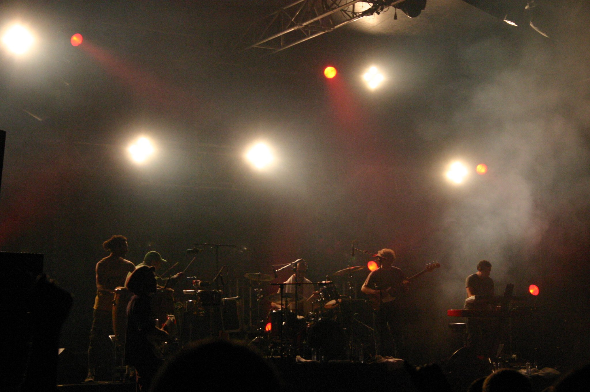 Percubaba au festival L'Armor à sons de Bobital en 2010